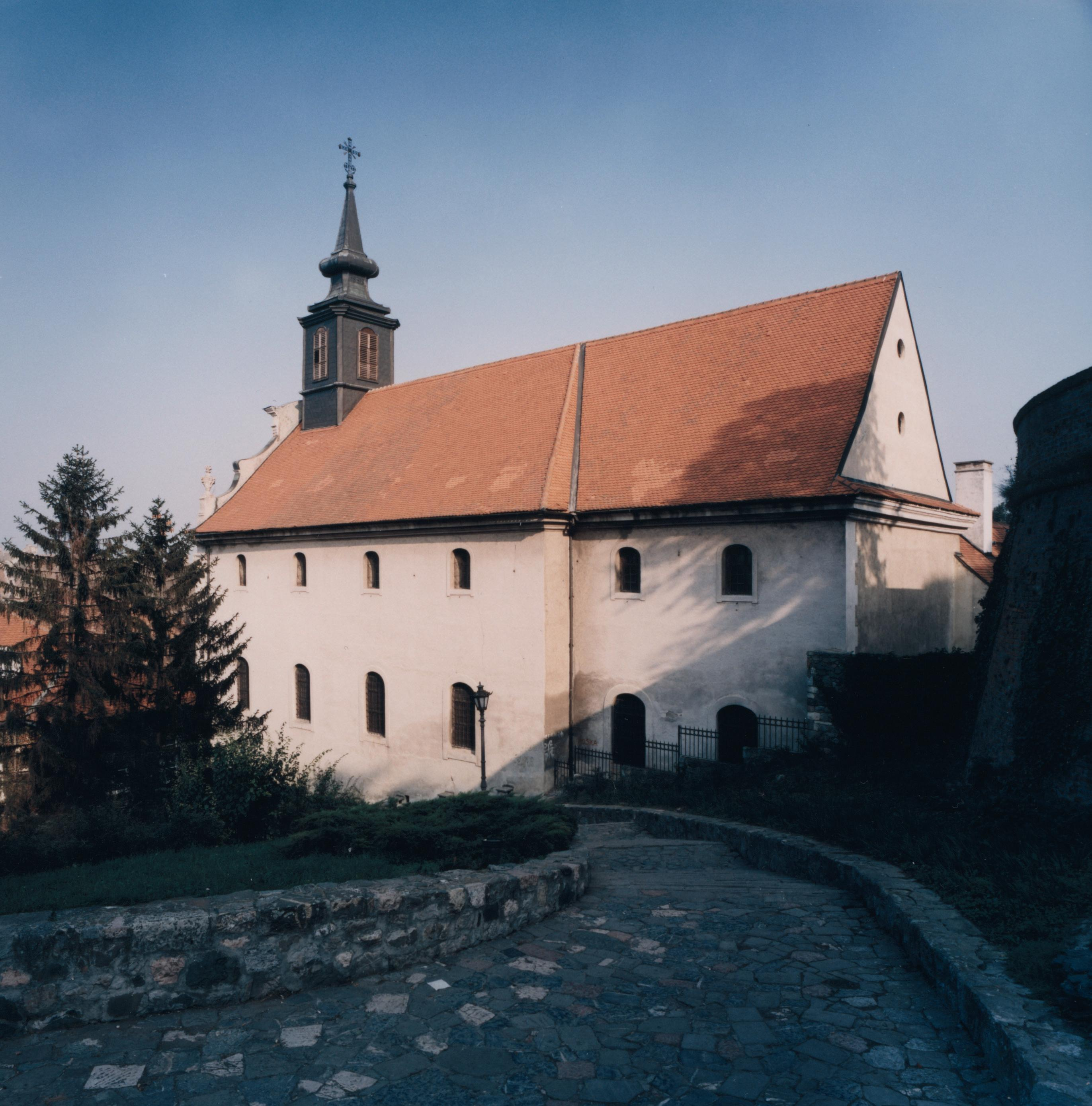 Pogled na crkvu sv. Jurja sa stuba petrovaradinske tvrđave